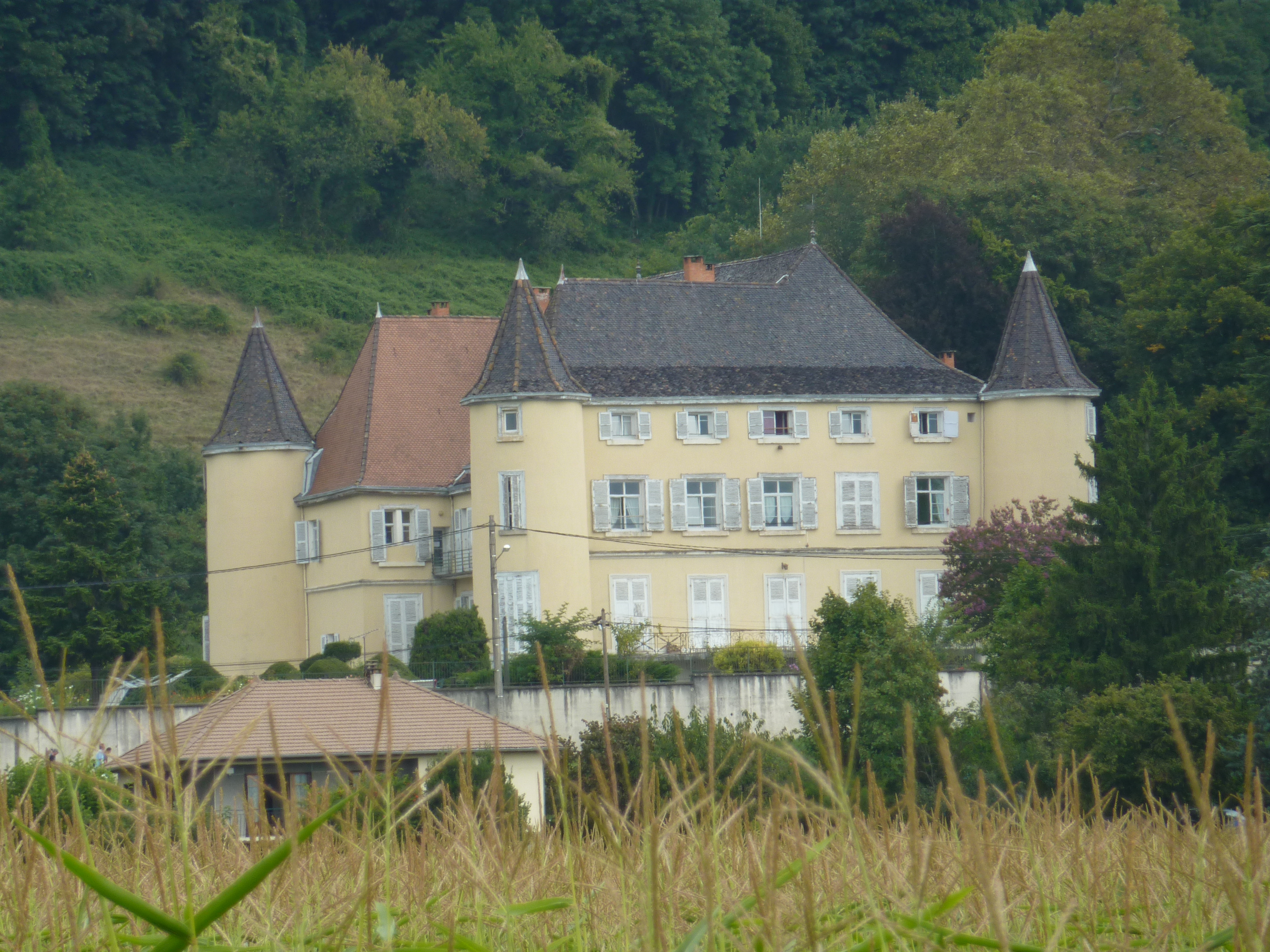 Château de Val Marie, Vourey, France